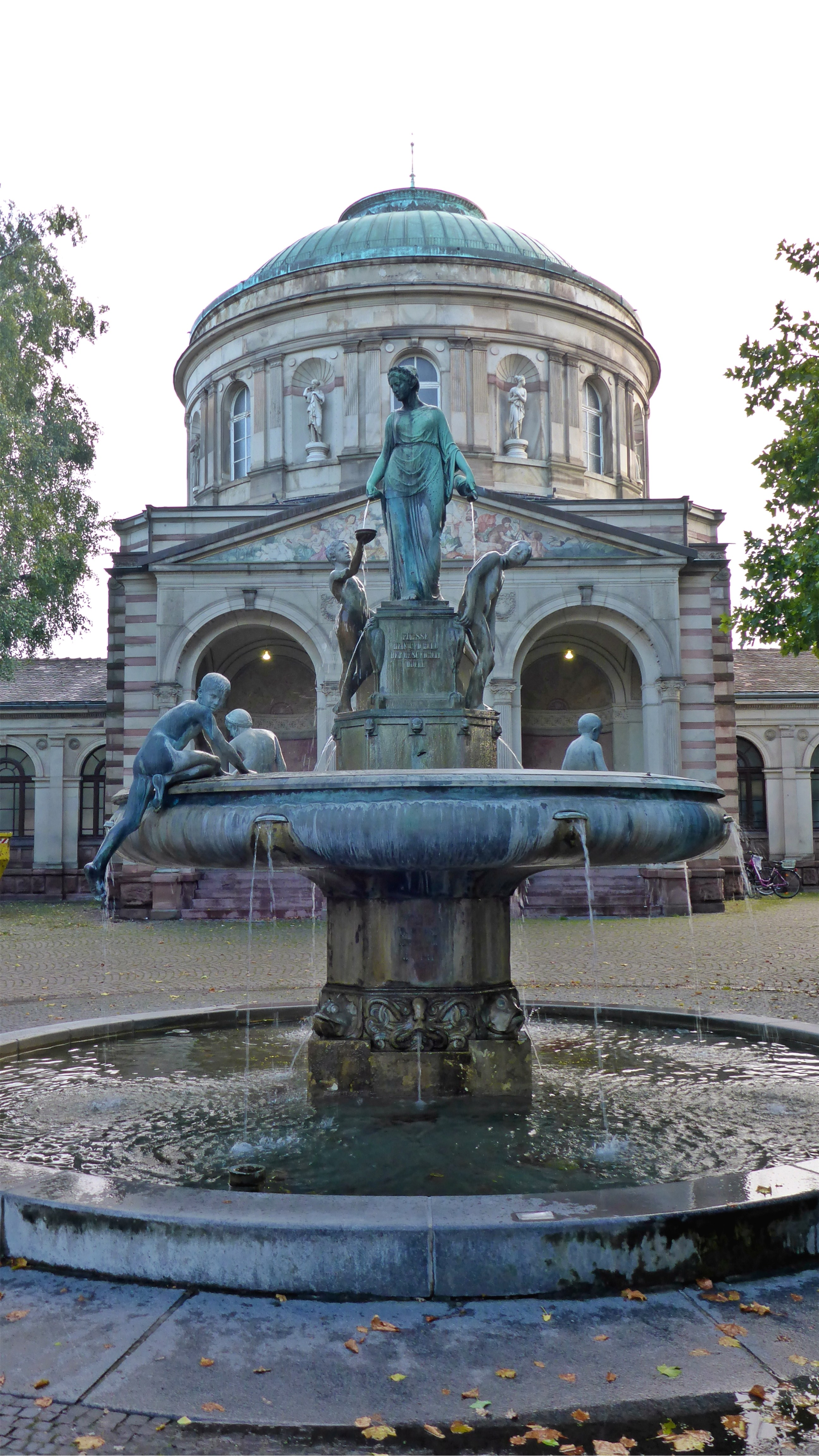 Der Hygieia - Brunnen auf dem Festplatz in Karlsruhe